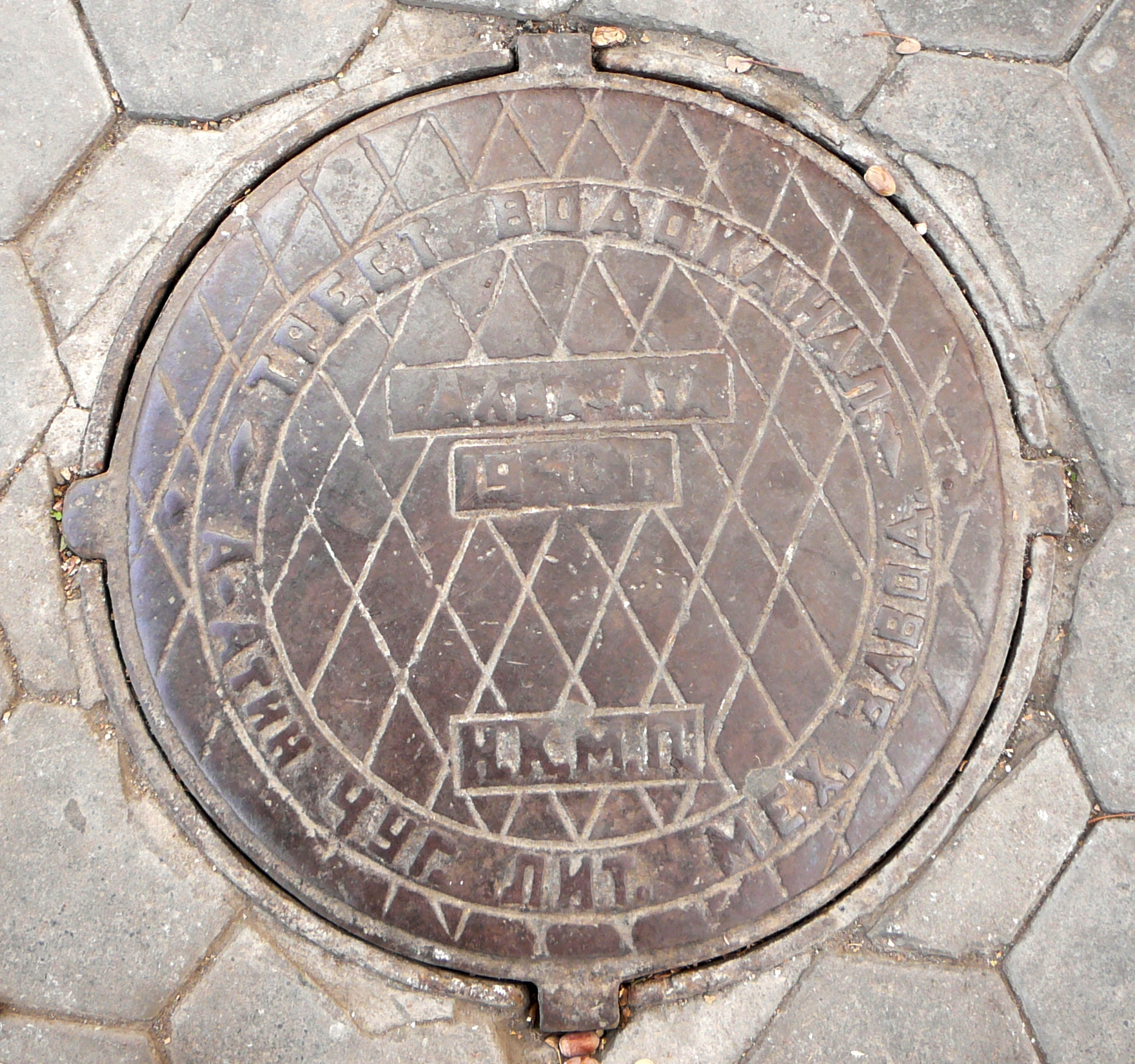 Чугунная крышка канализационного люка 1950-го года выпуска. Алма-Атинский Чугунолитейный Механический Завод. г. Алма-Ата. ул.Калдаякова угол Айтеке Би